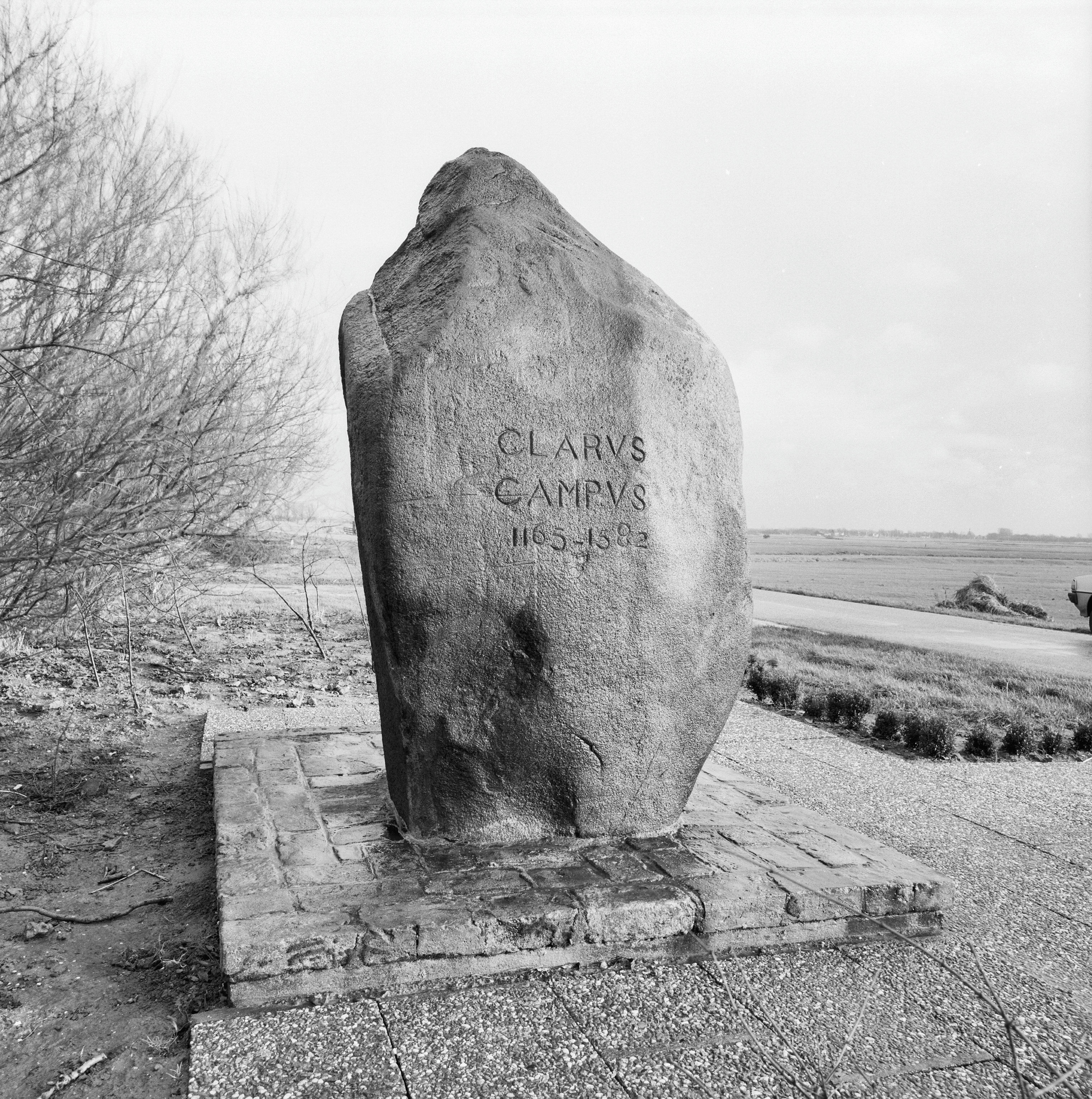 Diversen: A, zwerfkei met opschrift